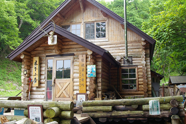 木下小屋（北海道斜里町） Kinoshita-goya (Shari-Town, Hokkaido, JAPAN)